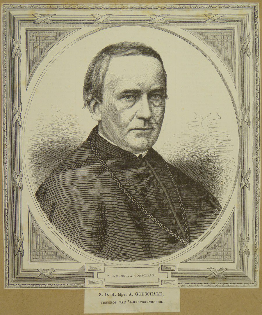 Mgr. A. Godschalk (1819-1892), gravure J. Walter (coll. Catharijne Convent)